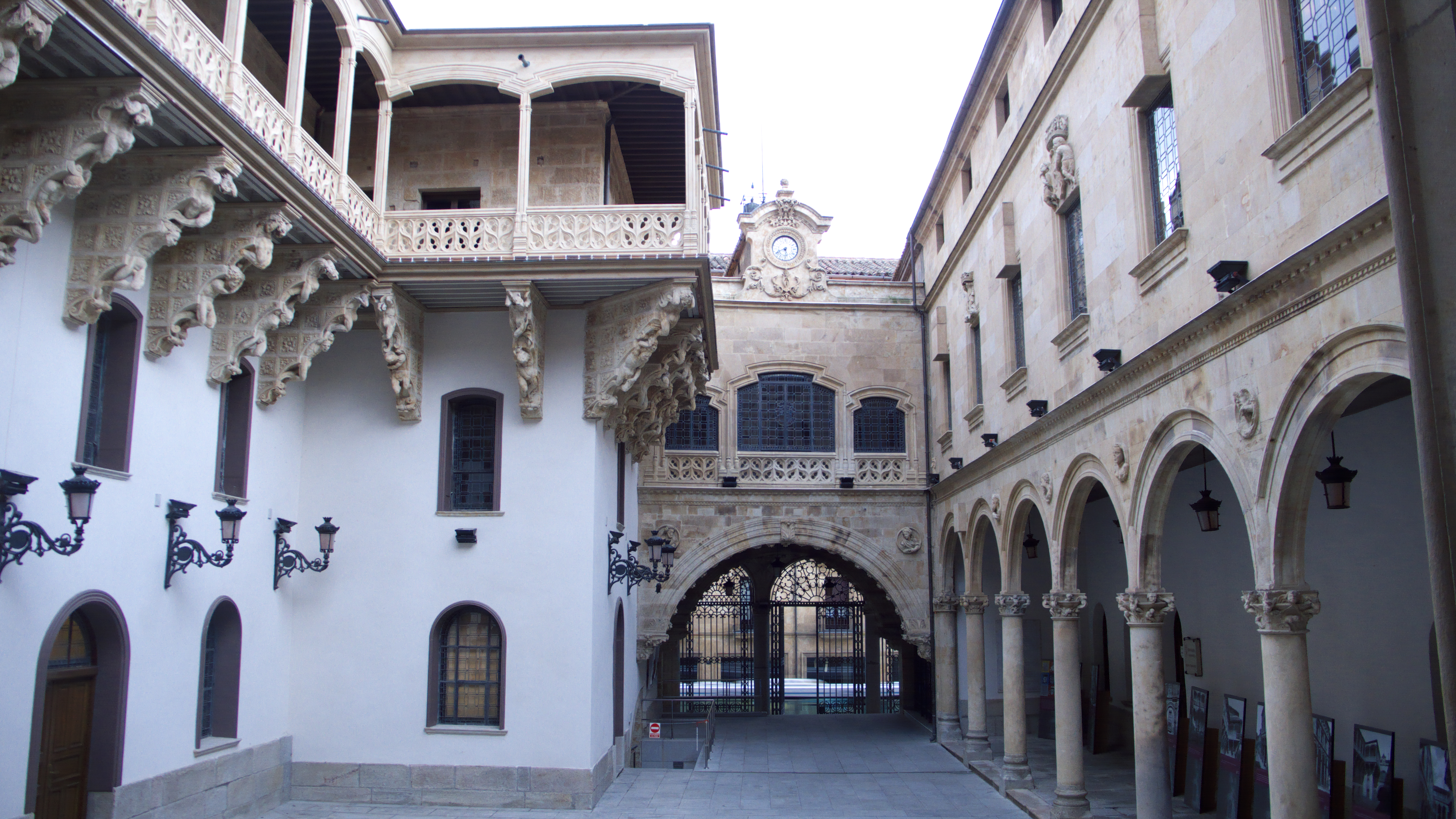 Mediados del siglo XVI. Rodrigo de Mexía promueve este palacio.